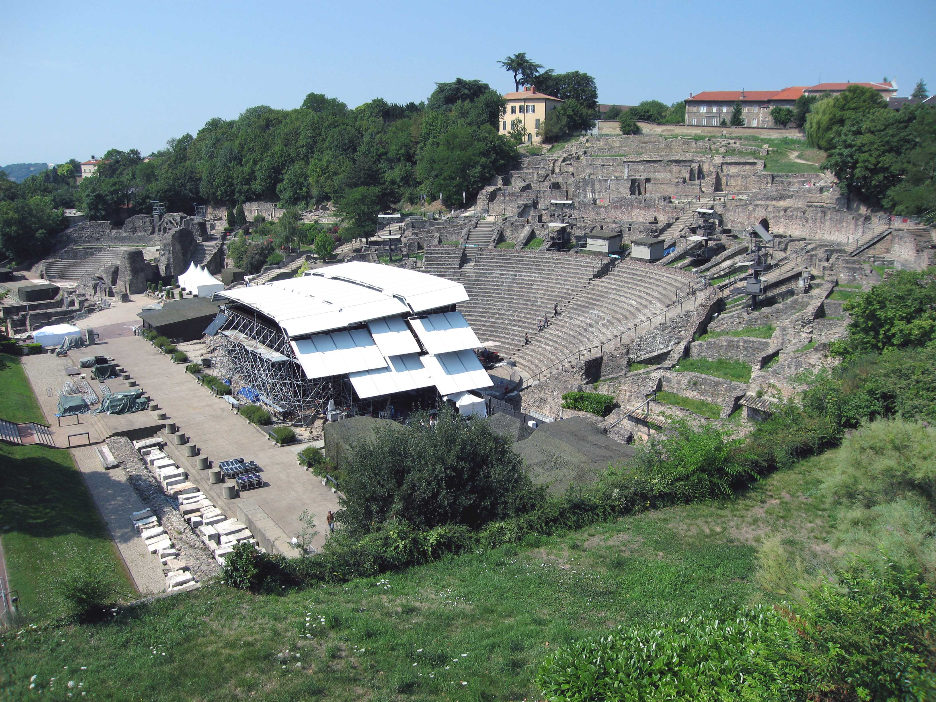 Théâtre et Odéon romains situés sur la colline de la Fourvière à Lyon ; les constructions devant le théâtre sont provisoires (festival de Fourvière), Lyon, France